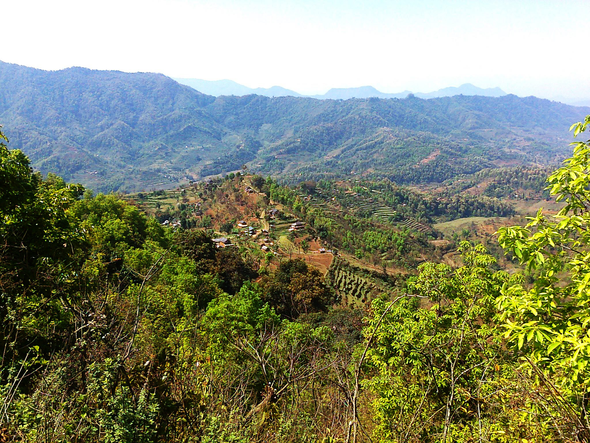 नेपाली: यो तस्बिर मिरकोट को उच्च भाग बाट लिइएको हो '